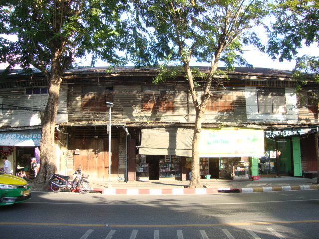 บ้านย่านวุฒากาศ